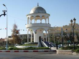 مركز مدينة وادي سوف، ولاية الواجدي ، الجزائرية هذا المبنى كان سابقا مقهى والآن هو جزيرة تقاطع أربعة طرق